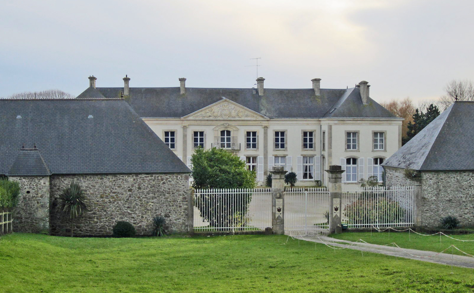 Quinéville, Manche